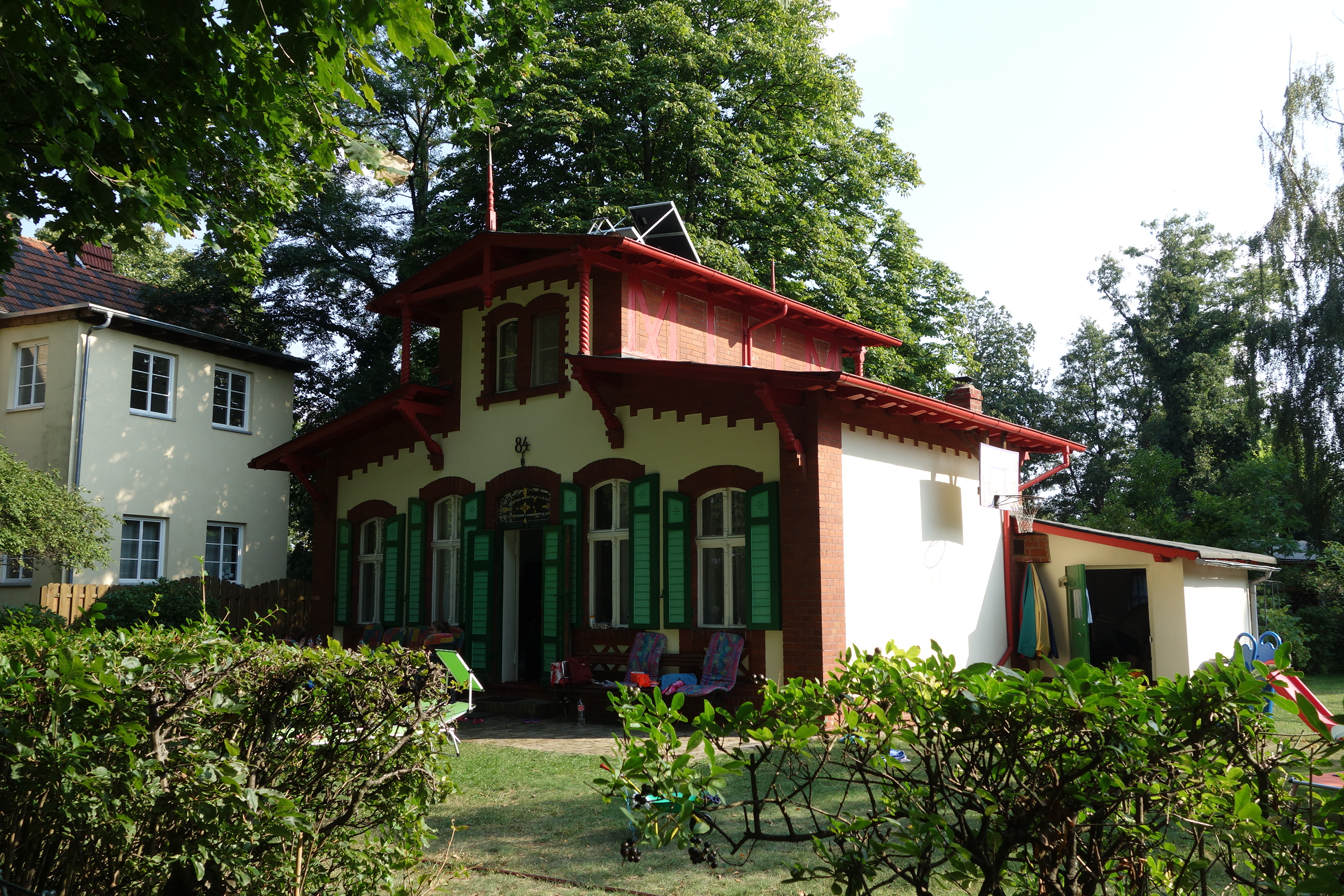 Kulturdenkmal Berlin-Tegel Valentinswerder 84